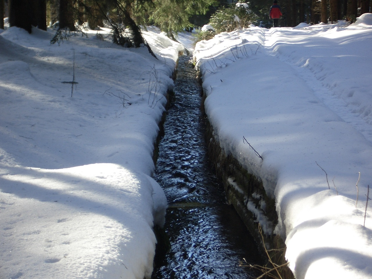 Dammgraben